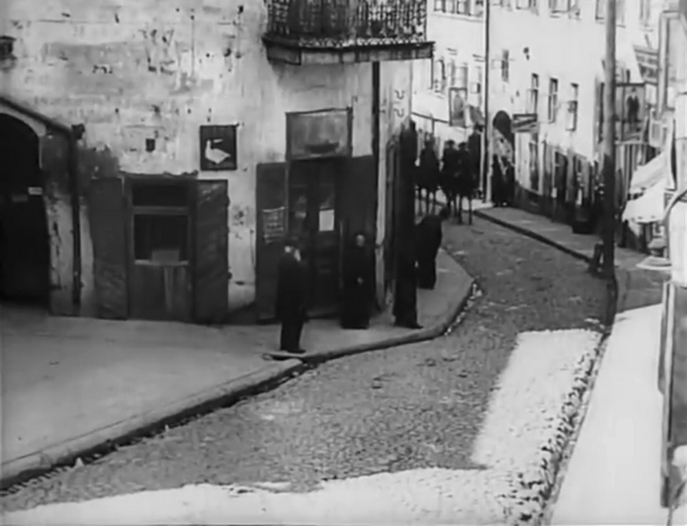 Беларуская (тарашкевіца): Менск (Miensk), Цёмныя Крамы (Ciomnyja Kramy), вуліца Казьмадзям’янаўская (vulica Kaźmadziamjanaŭskaja)